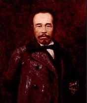 Depicted person: Kawakami Tōgai